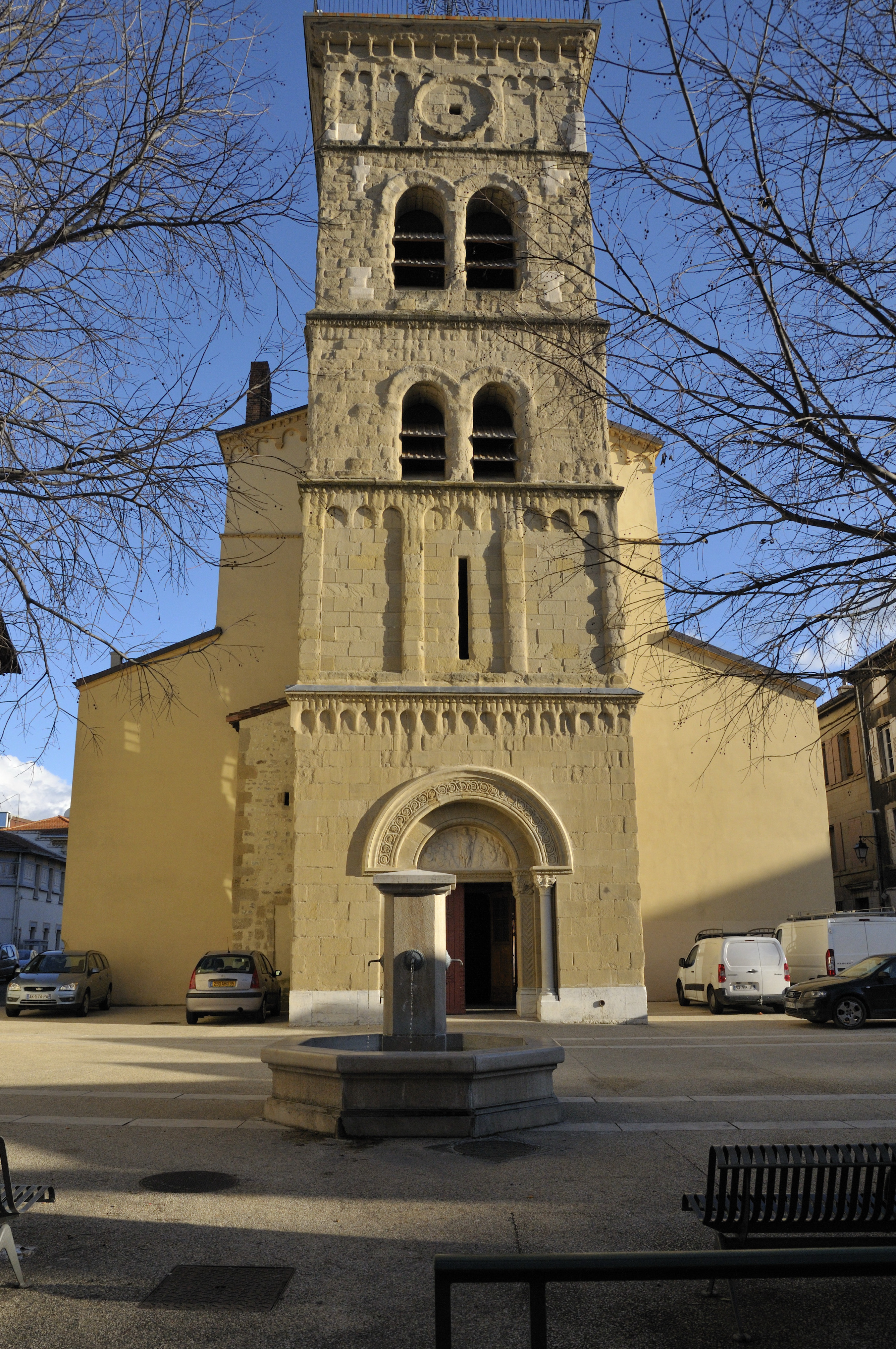 église saint jean baptiste